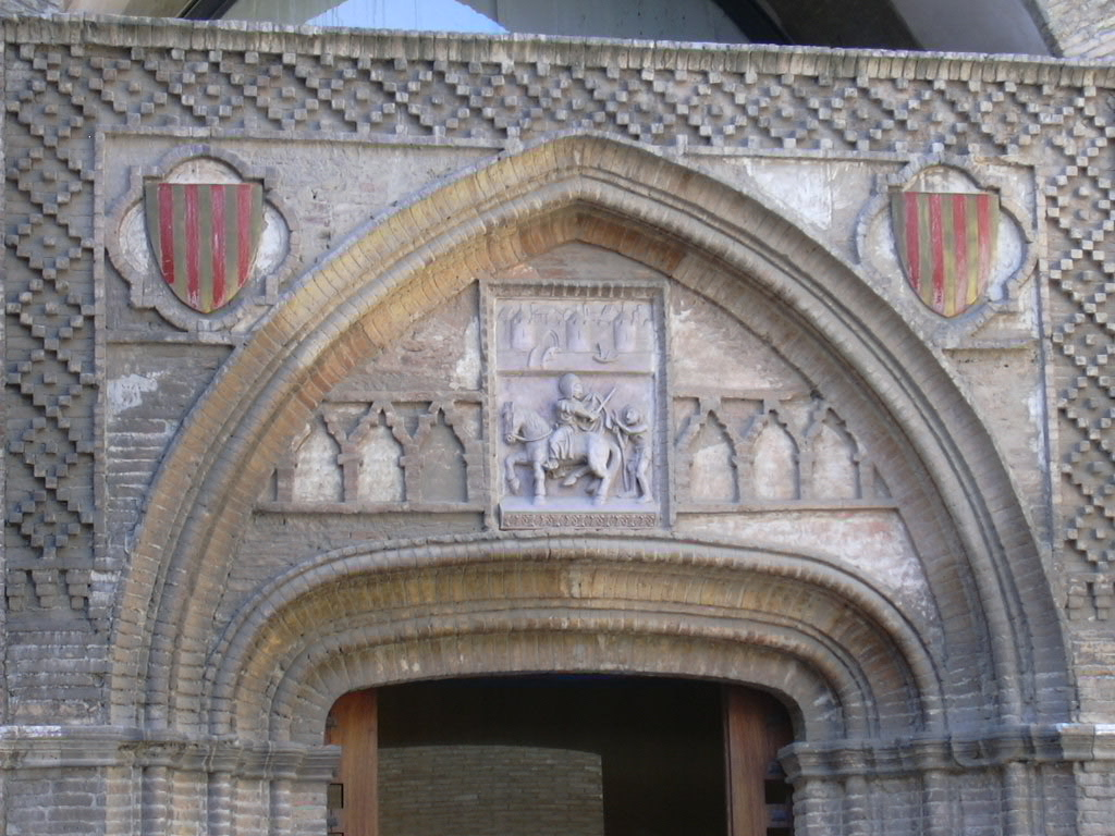 Portada de Martín I el Humano — entrada a capilla de San Martín, Patio de entrada, La Aljafería. Gothic-Mudejar en Zaragoza, Aragón, España.